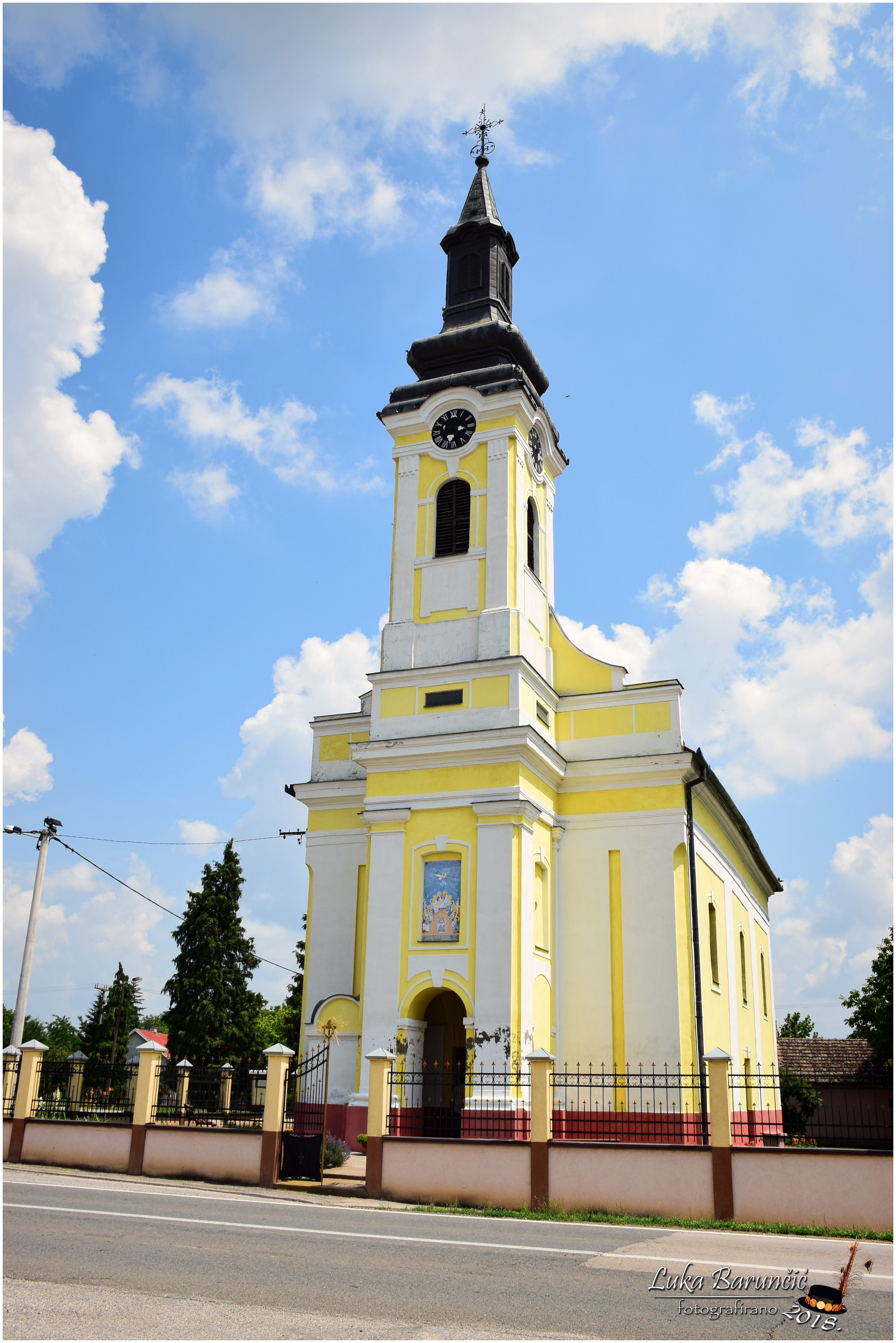 Crkva sv. Duha